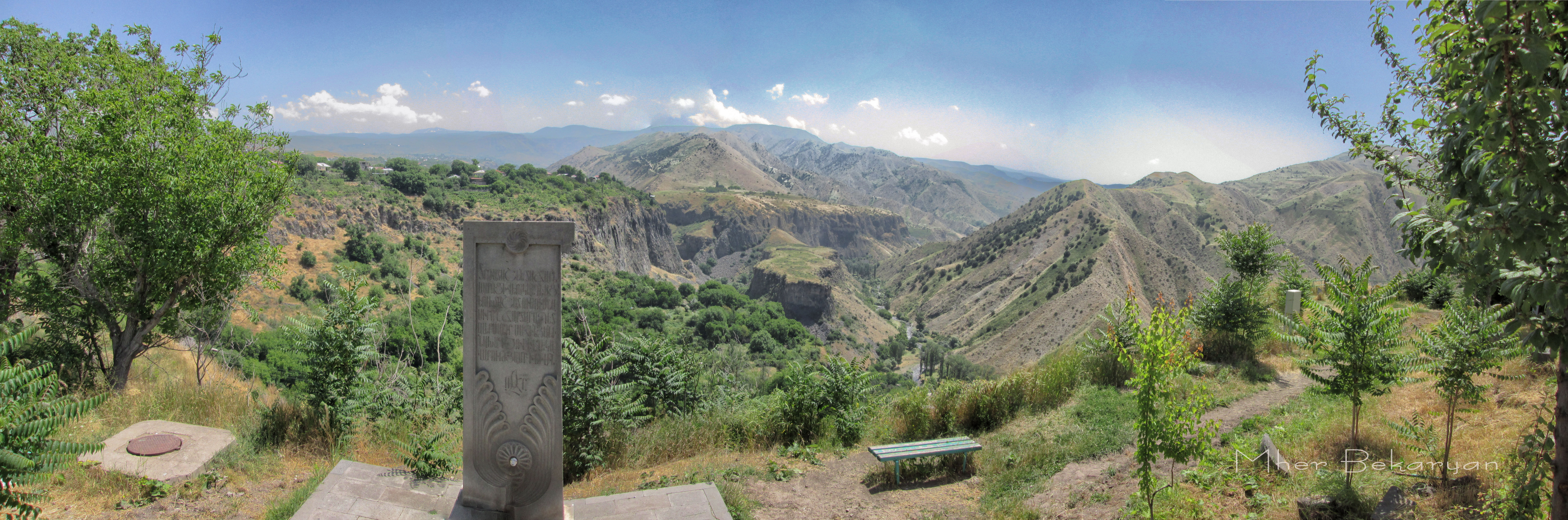 Հուշակոթող` նվիրված տաճարի վերականգնմանը և ճարտ. Ալ. Սահինյանին 1978 թ. տաճարի հս-աե կողմում 21/4.11